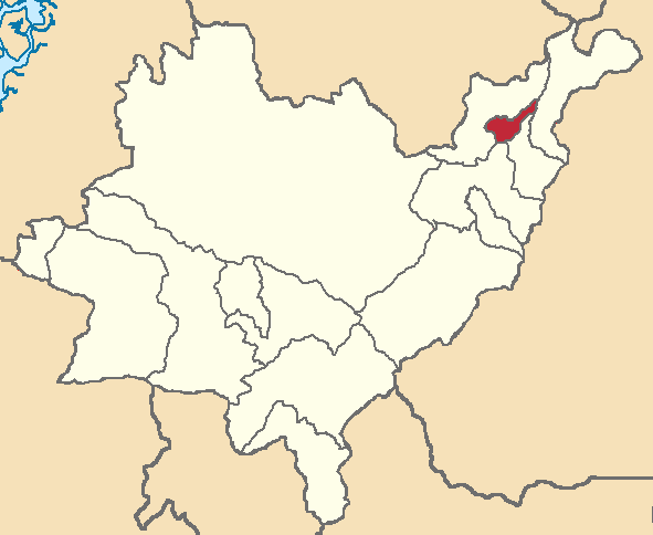 Mapa localizacor del cantón en Azuay, Ecuador